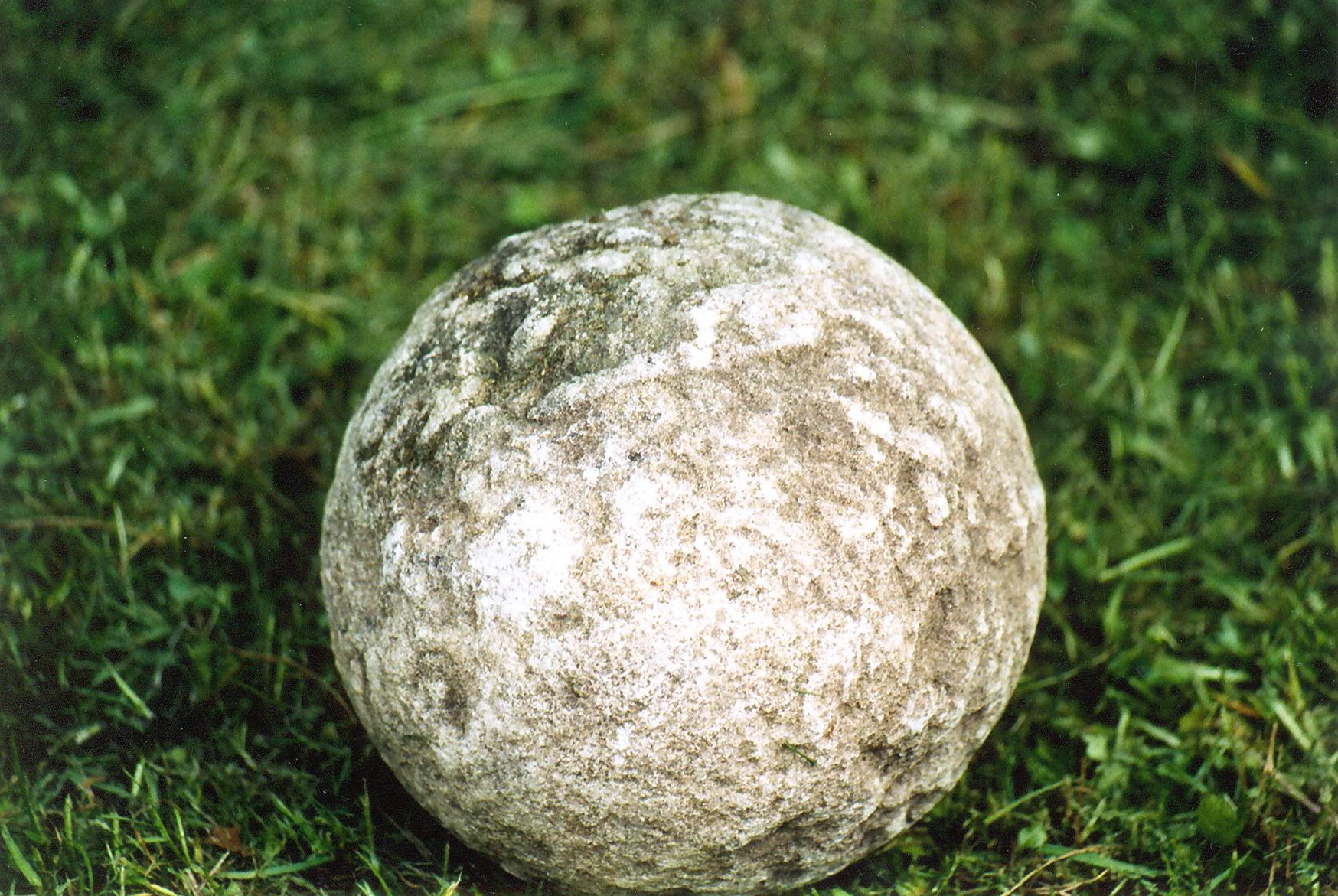 Kanonenkugel gefunden in der Burgruine Loch